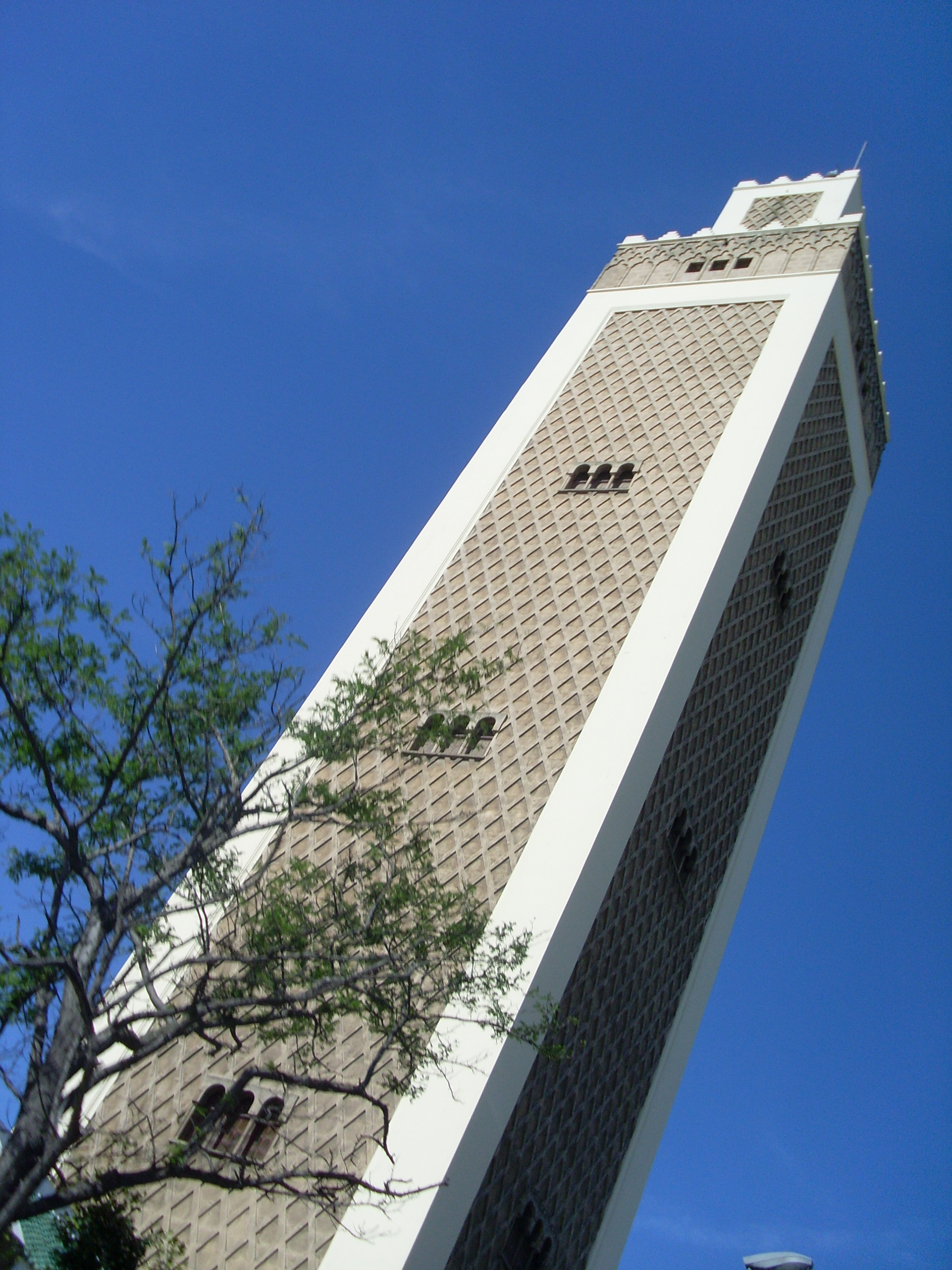 Gran Alminar en Tánger.